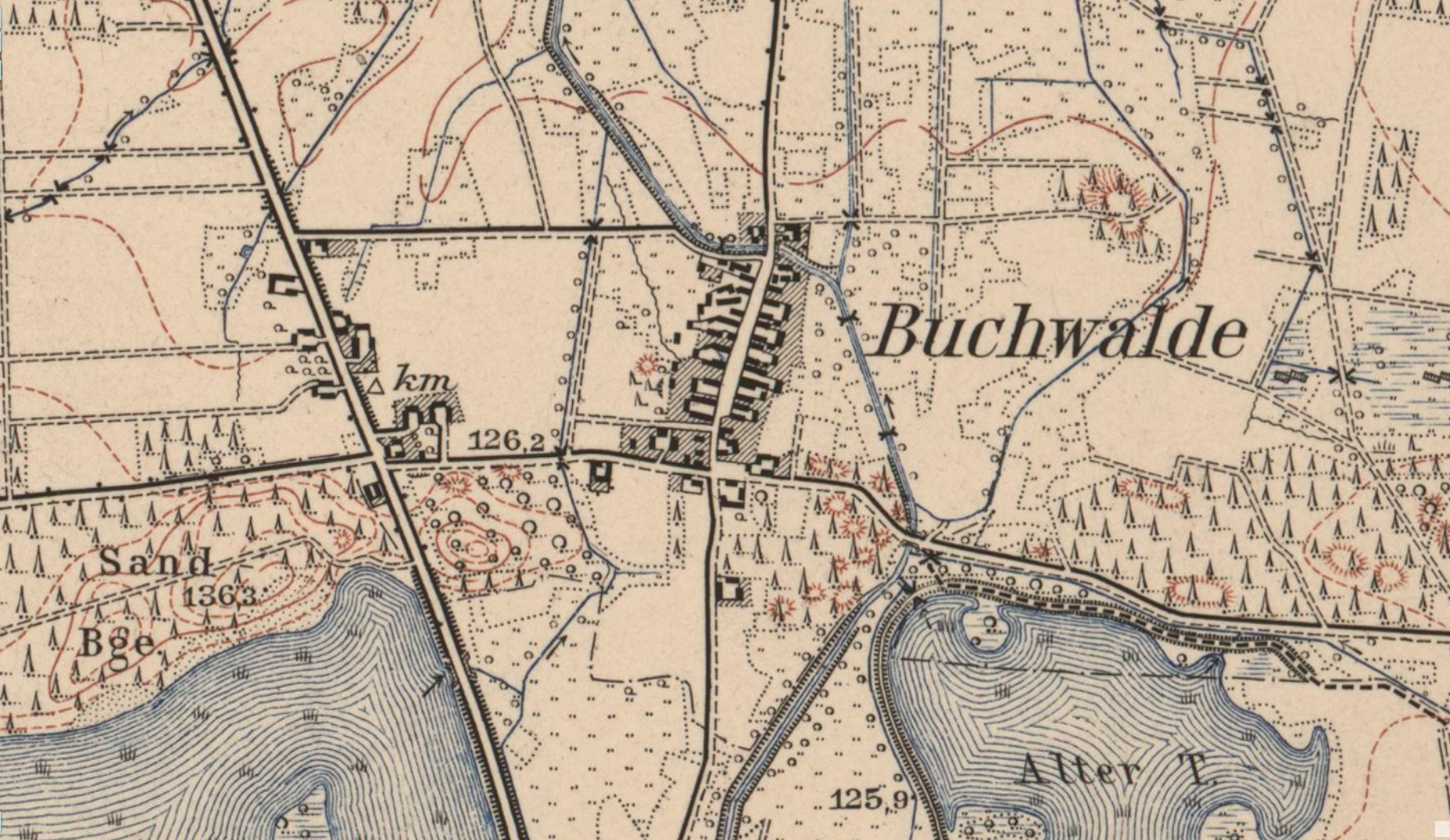 Der Ort Buchwalde bei Groß Särchen auf dem Messtischblatt von 1908. Hornjoserbsce: Bukojna pola Wulkich Zdźarow na hamtskej karće z lěta 1908.